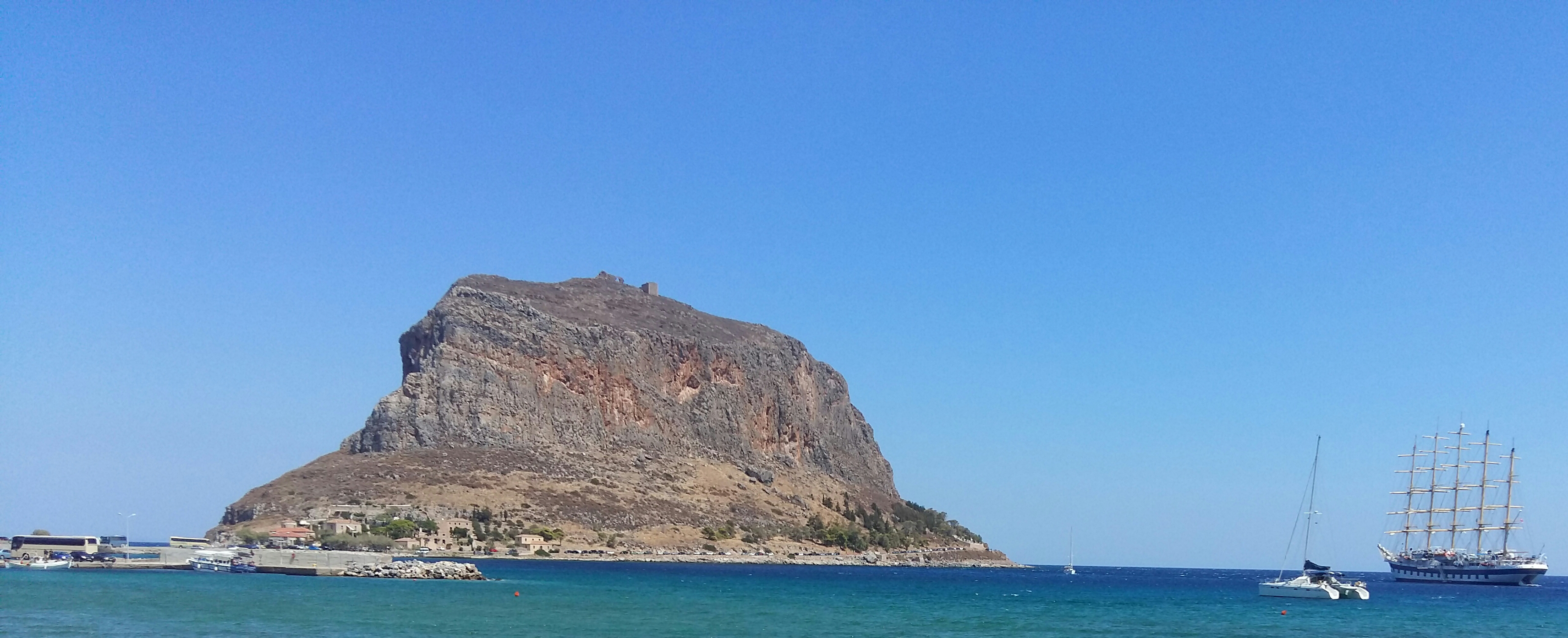 Αρχαιολογικός Χώρος Κάστρου Μονεμβασίας«Αρχαιολογικός Χώρος Κάστρου Μονεμβασίας»